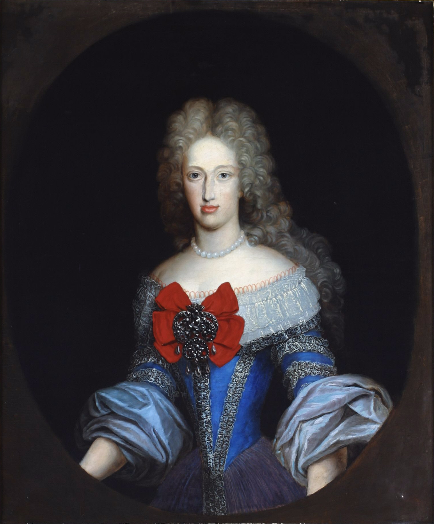 Maria Anna (1667-1740), Pfalzgräfin bei Rhein zu Neuburg, Königin von Spanien